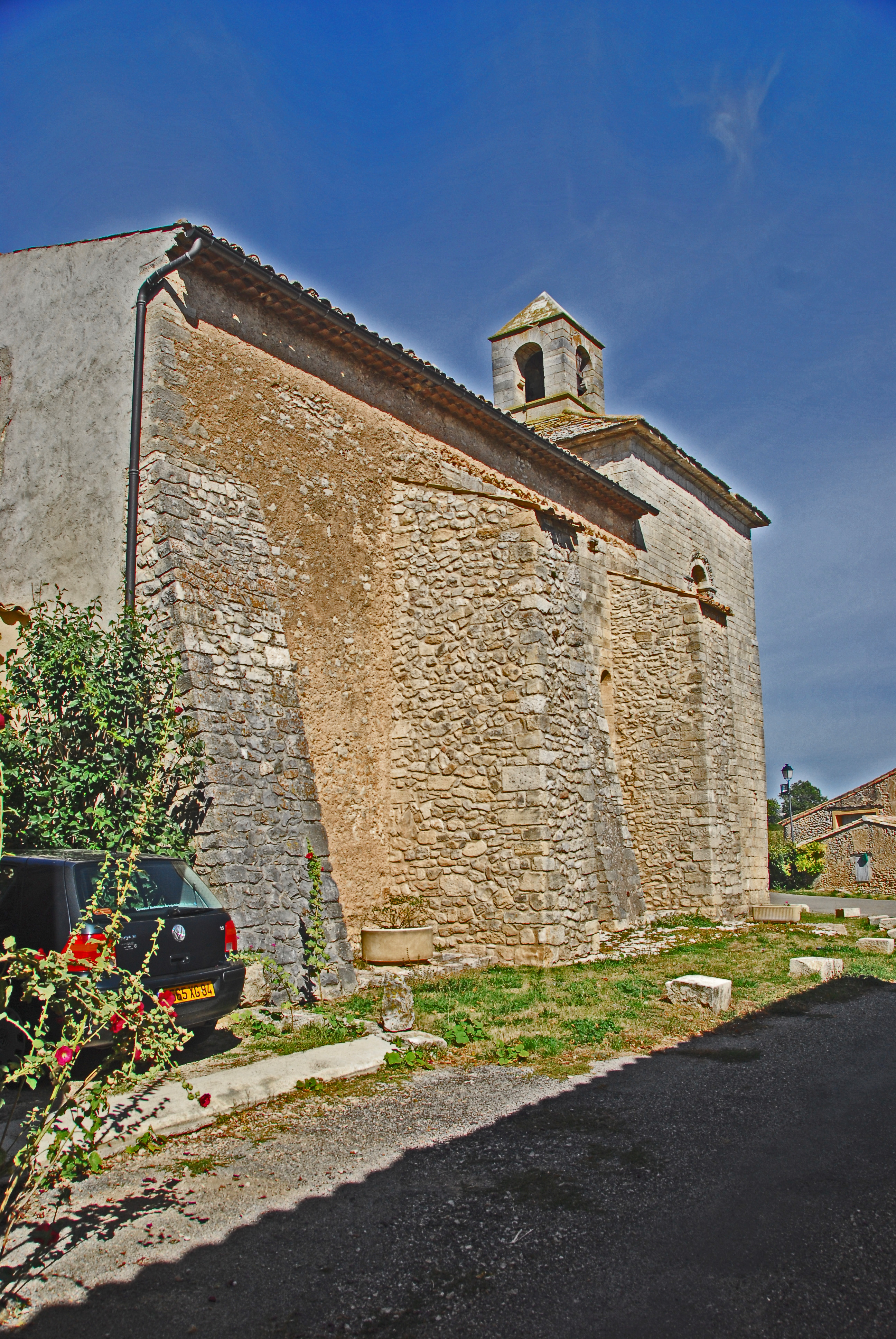 St-Trinit, Gesamtansicht von Süden